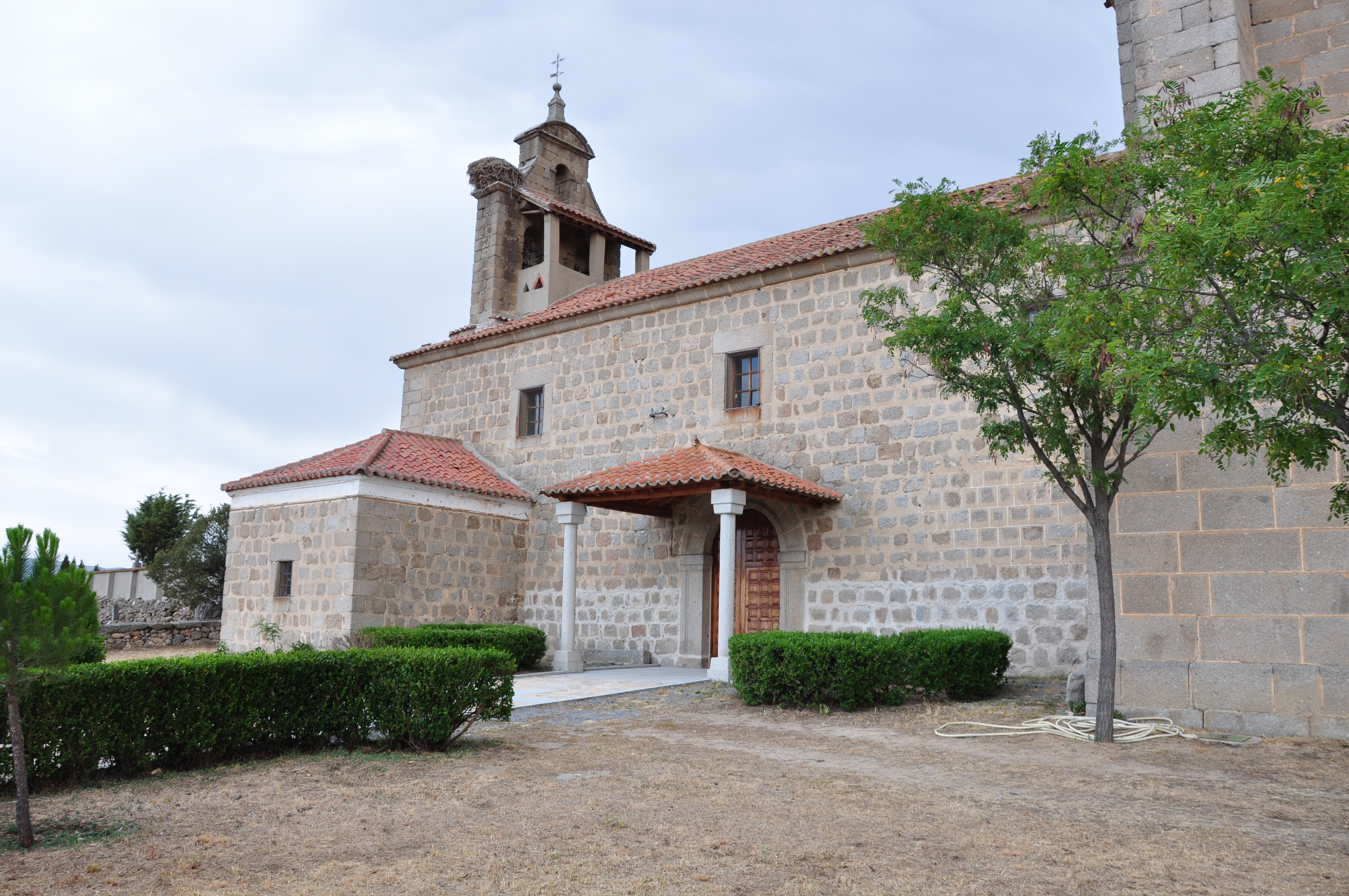 Iglesia parroquial de la Asunción de Nuestra Señora, Santa María del Arroyo (Ávila), España.